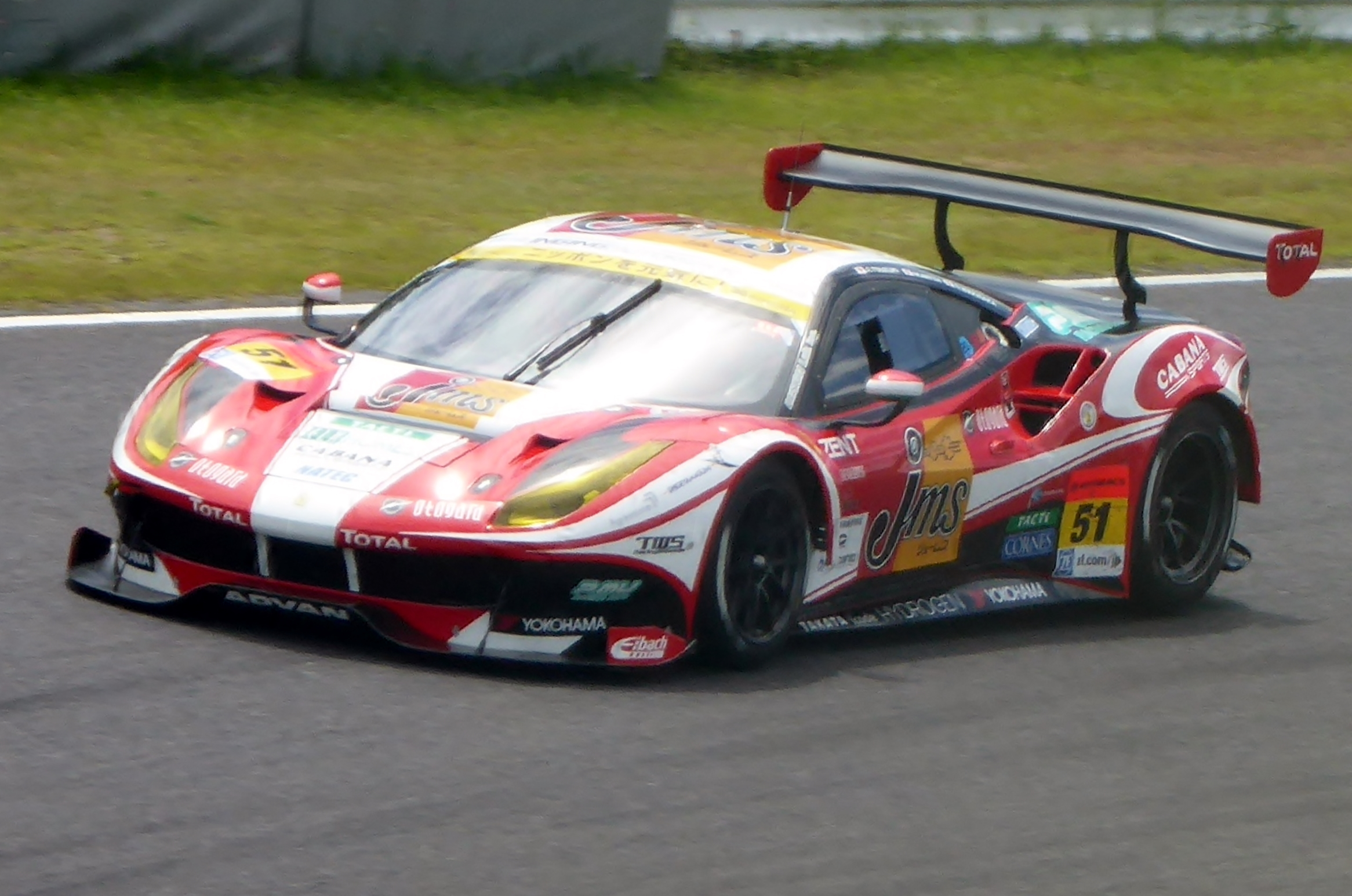 2016年鈴鹿1000㎞における51号車JMS LMcorsa 488 GT3を撮影。